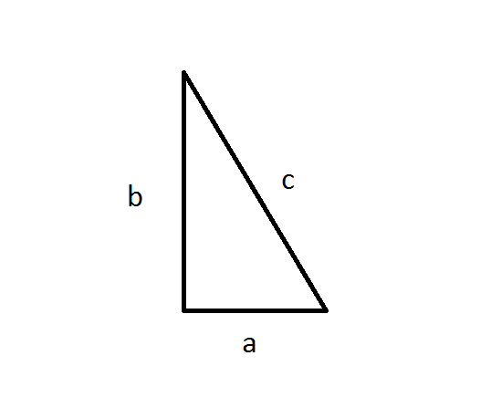 勾股弦直角三角形